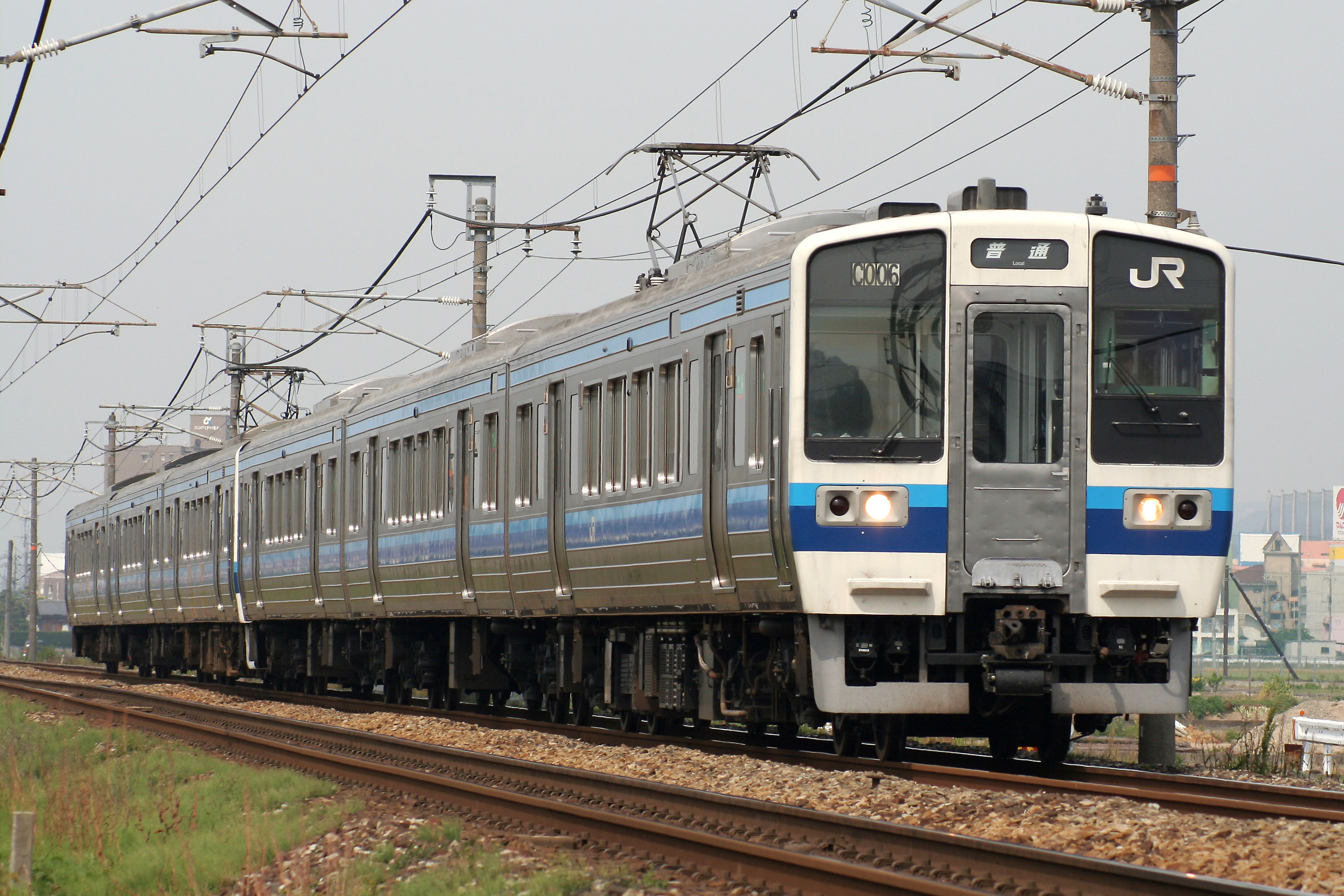 JR西日本213系 クモハ213-6 山陽本線、中庄-庭瀬間